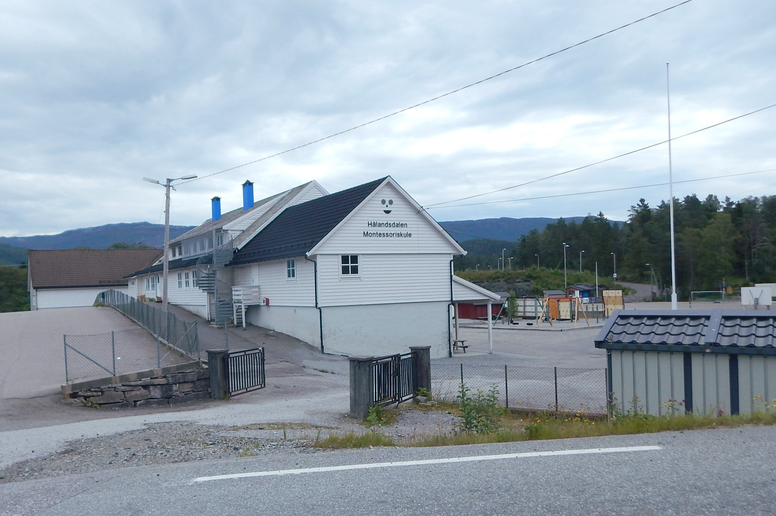 Hålandsdalen montessoriskole (Hålandsdalen montessoriskule)